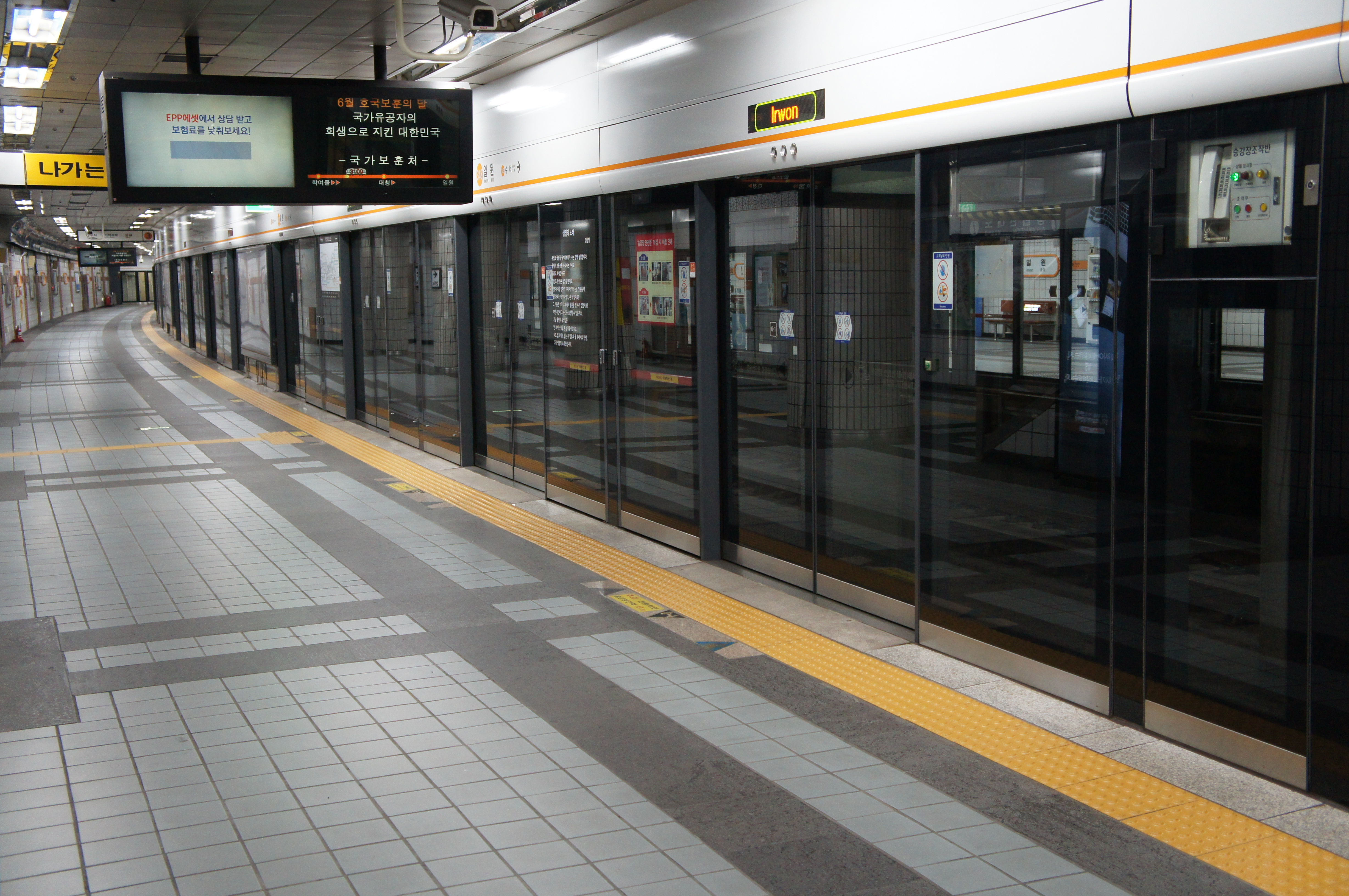 일원역 승강장